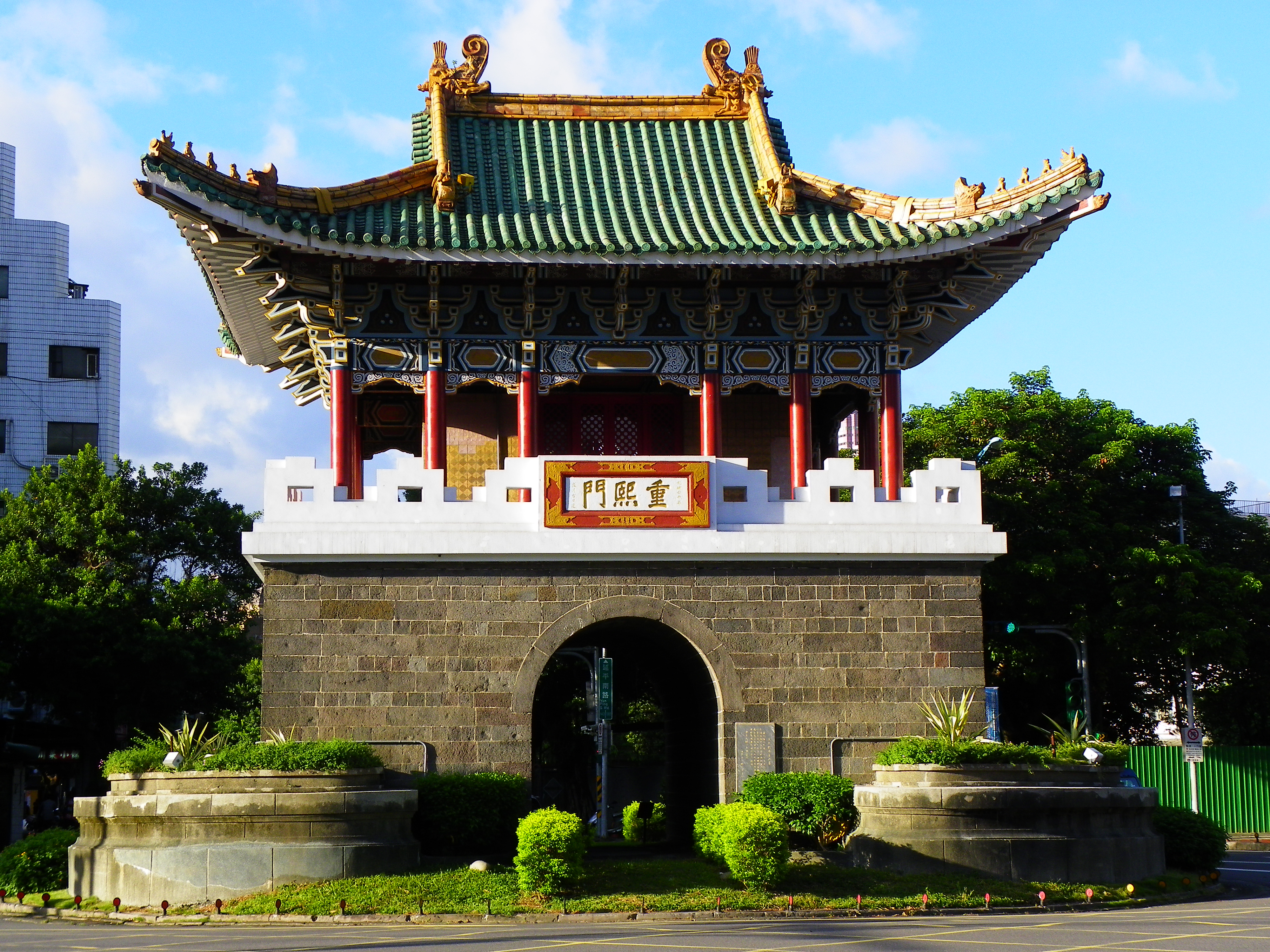 臺北市臺北府城重熙門（小南門）正面。